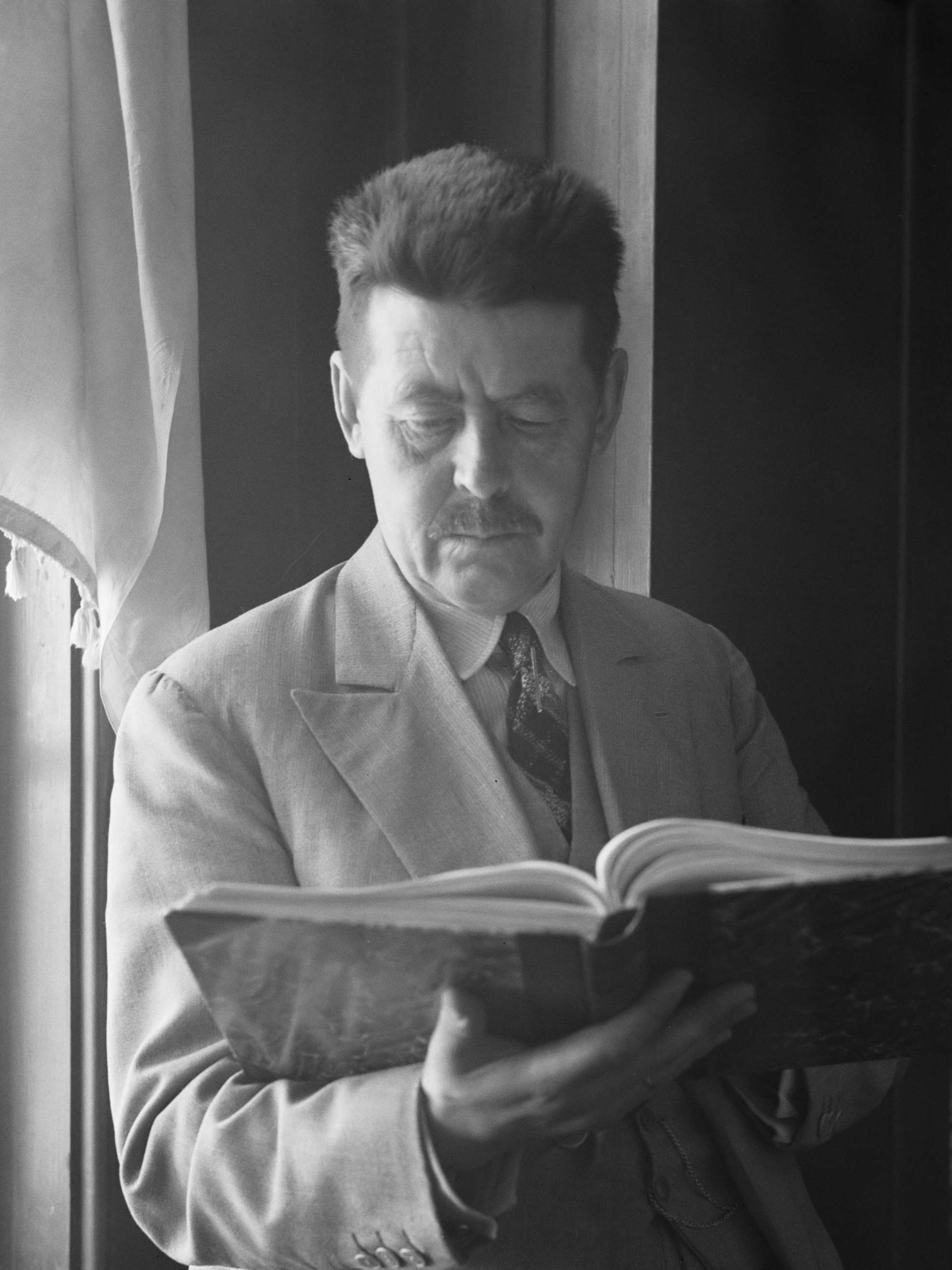 Portret van Guðmundur Finnbogason, historicus en bibliothecaris van de Nationale Bibliotheek 1934